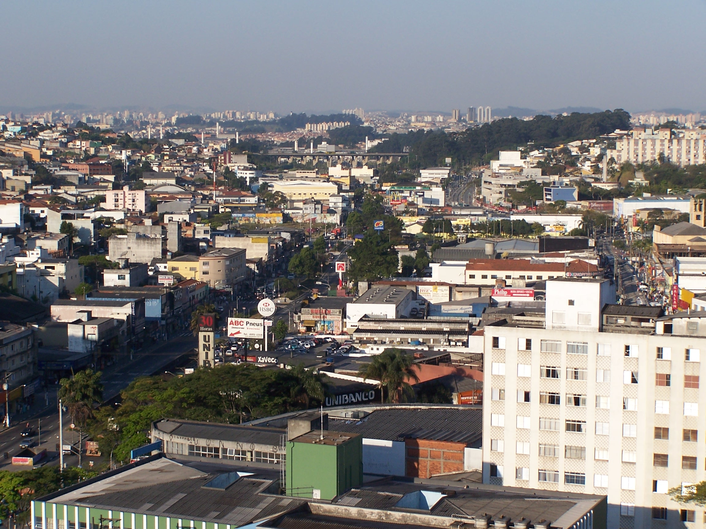 Visão aérea da cidade de Diadema(SP-Brasil).